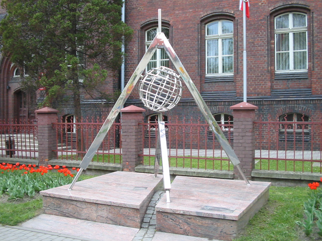 Obelisk wyznaczający 50 równoleżnik szerokości geograficznej. Wodzisław Śląski 2005 r.